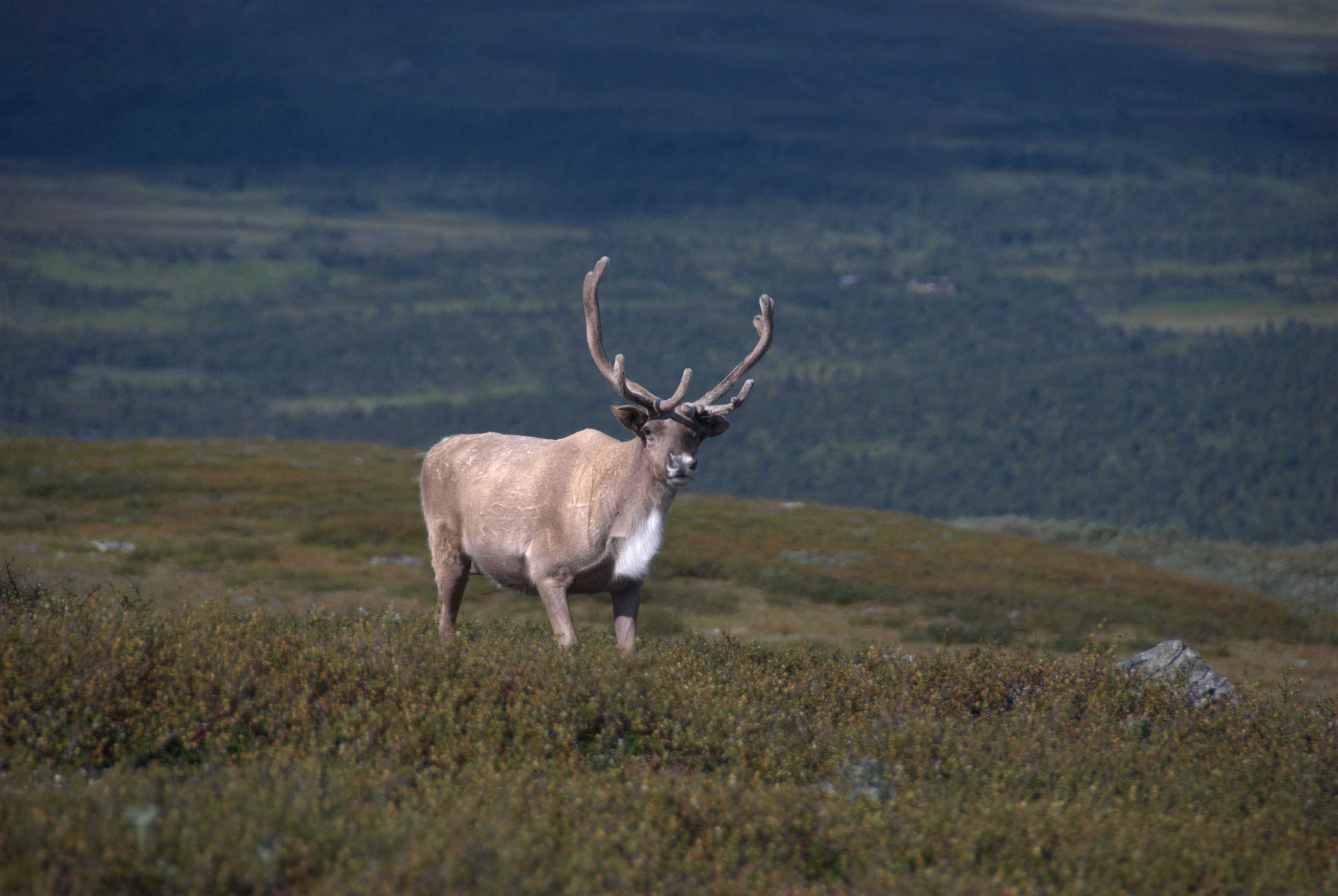 Reindeer in Vindelfjällen, seen from Kungsleden between Serve and Aigert